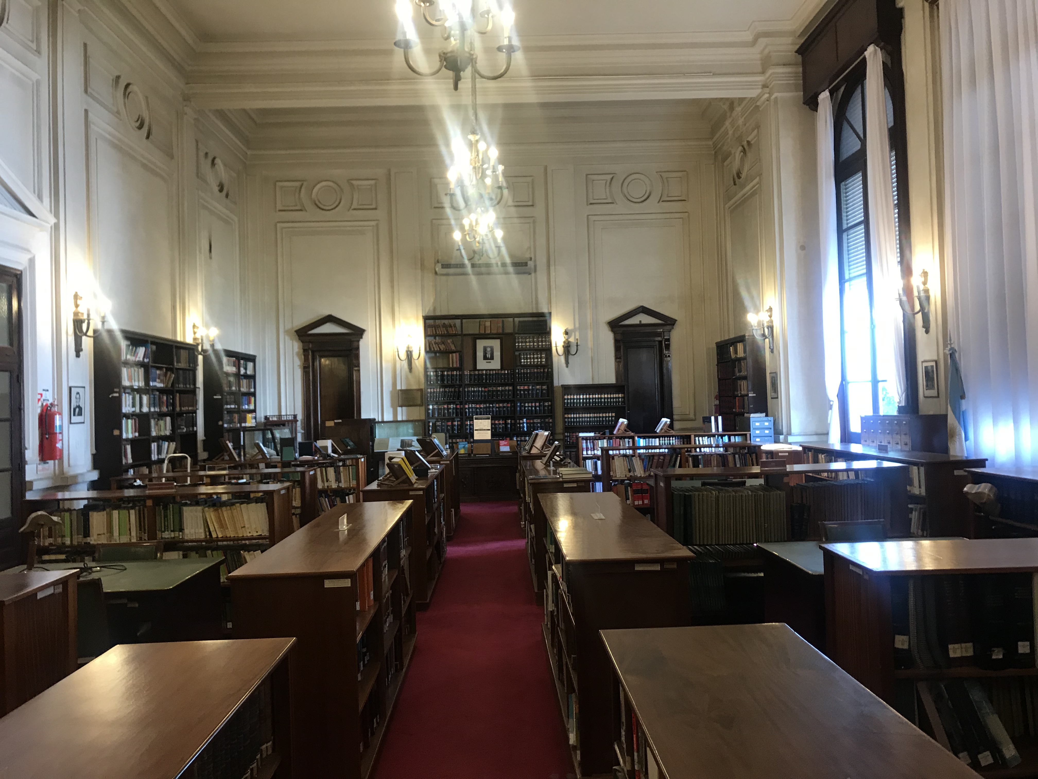 Biblioteca de la Suprema Corte de Buenos Aires